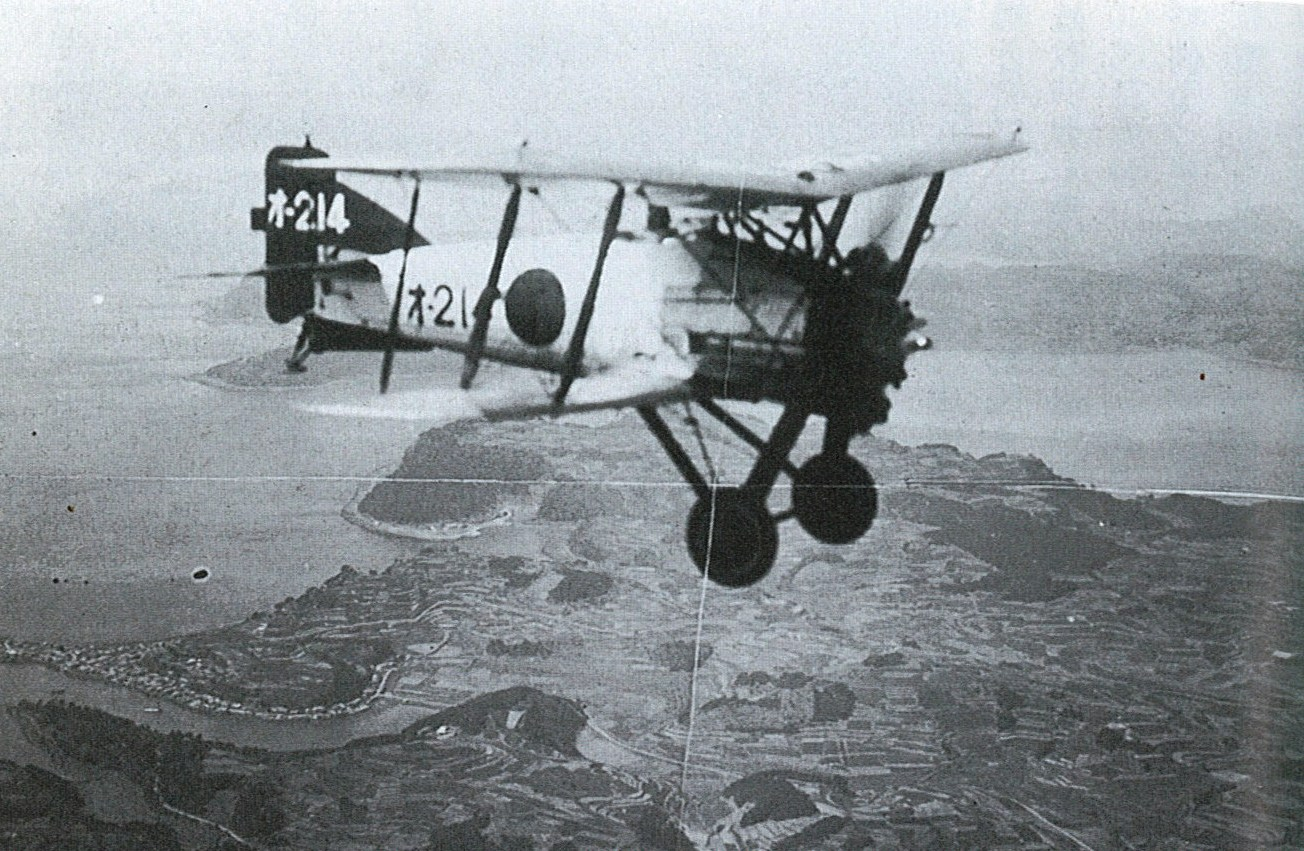 長崎県上空を飛ぶ3式艦戦2号機、大村航空隊所属の進藤三郎機。